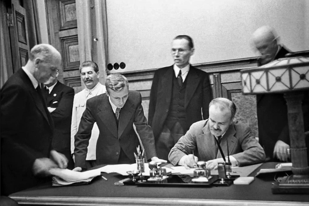 Нарком иностранных дел СССР В.М. Молотов подписывает договор о дружбе и границе между СССР и Германией. Среди присутствующих: И.В. Сталин, переводчик МИД В.Н. Павлов